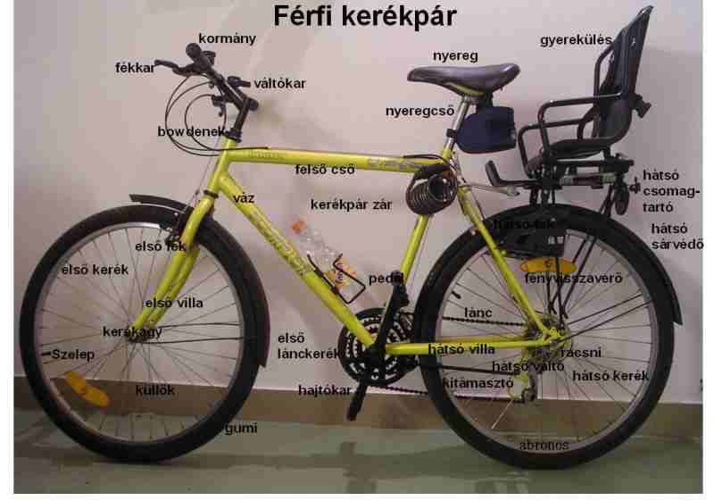 Férfi kerékpár